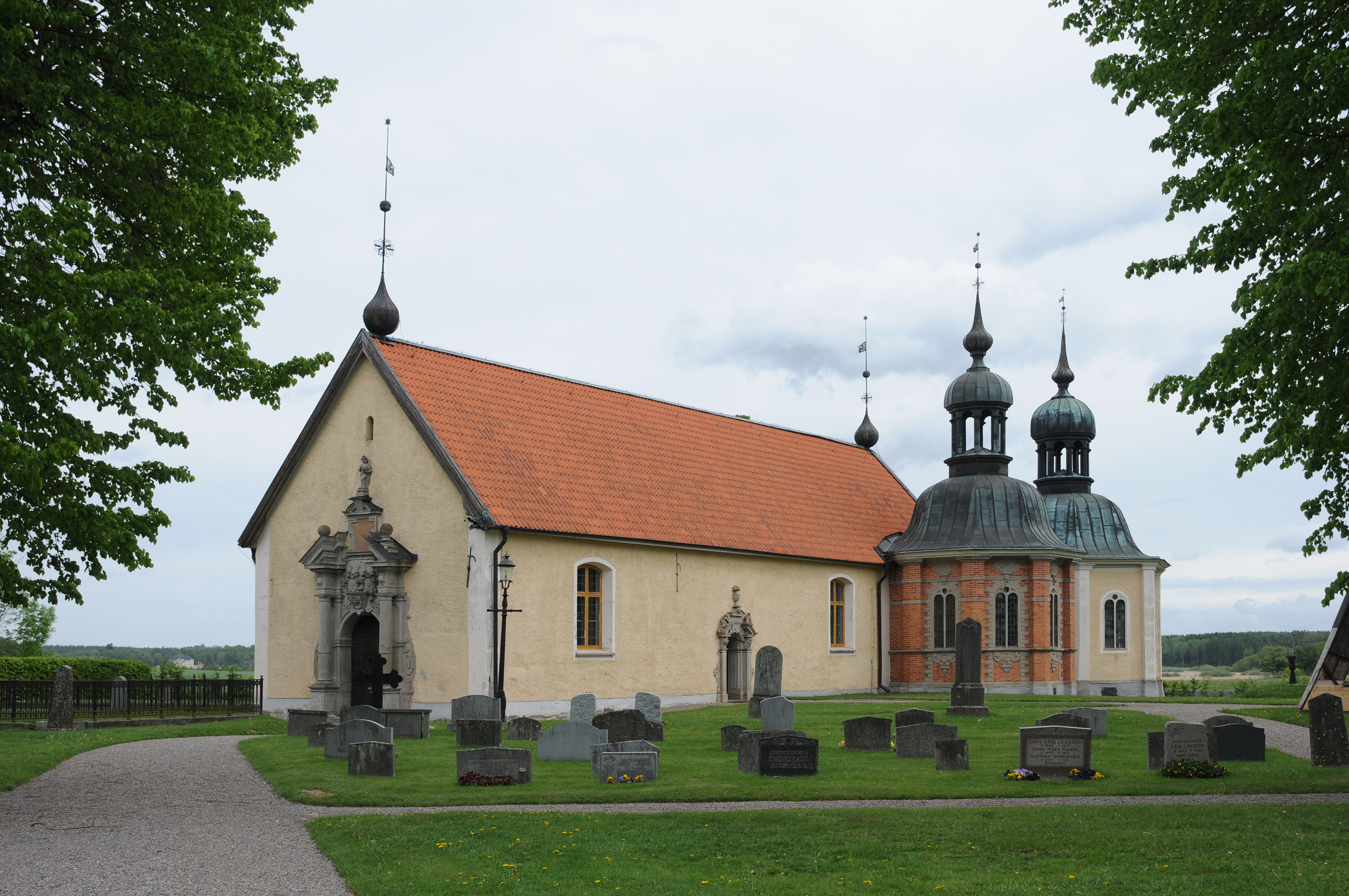 Vadsbro kyrka i Flens kommun